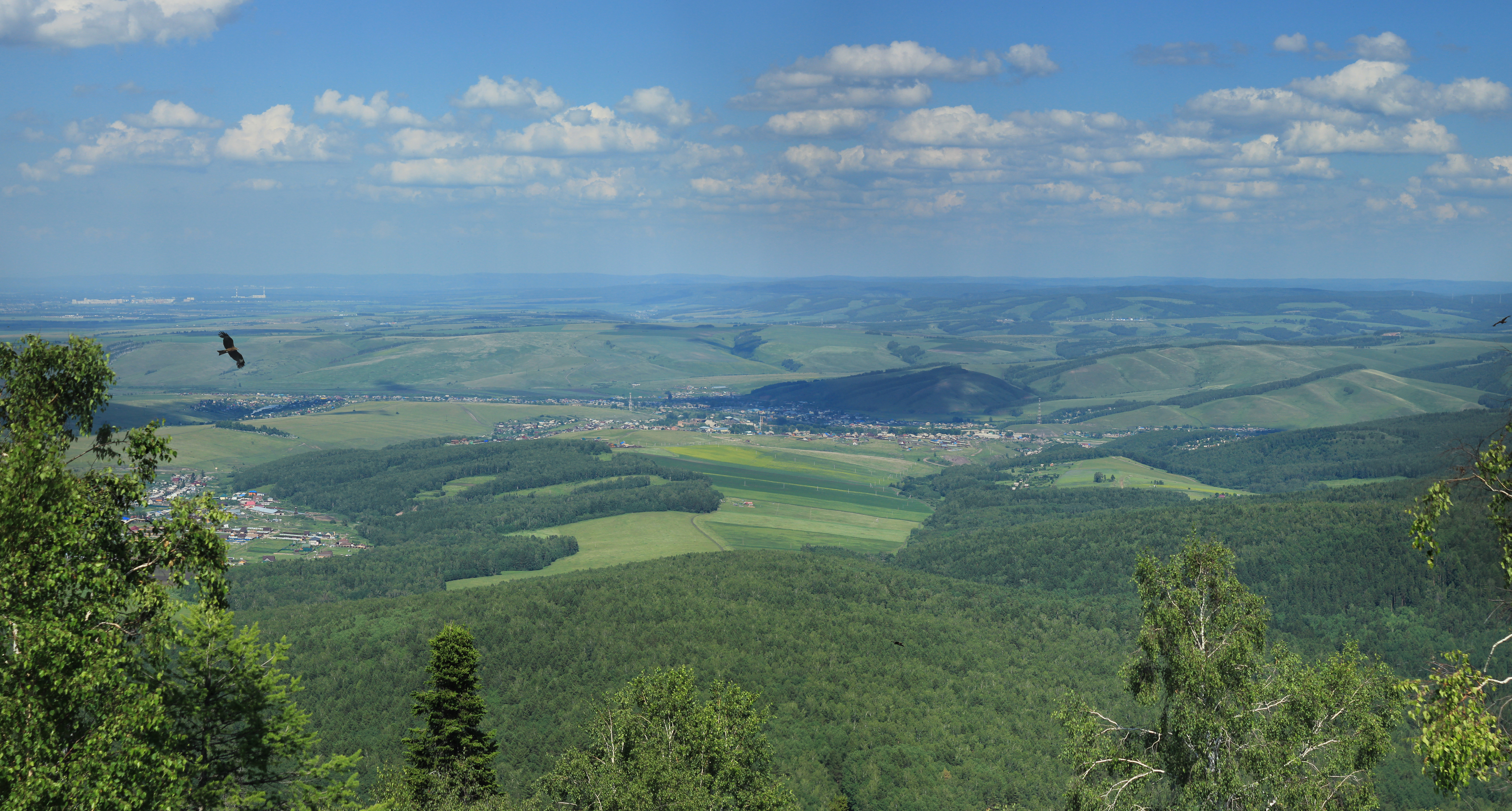 Чёрная сопка: Березовский район, Красноярский край На фото вид, который открывается с вершины горы Чёрная сопка в сторону станции Зыково (пригород Красноярска) — одного из наиболее удобных пунктов, от которого можно дойти до Чёрной сопки. This image is related to the protected area of Russia number 2410228